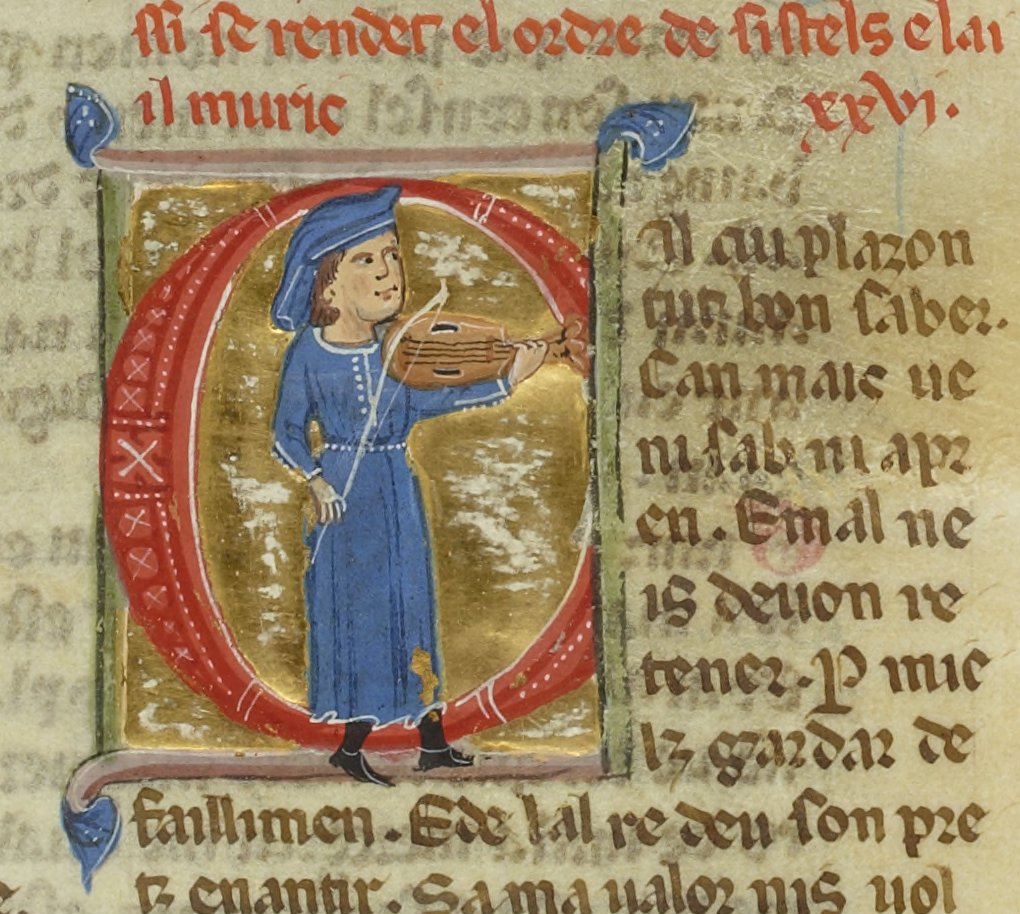 FR 854, folio 49r